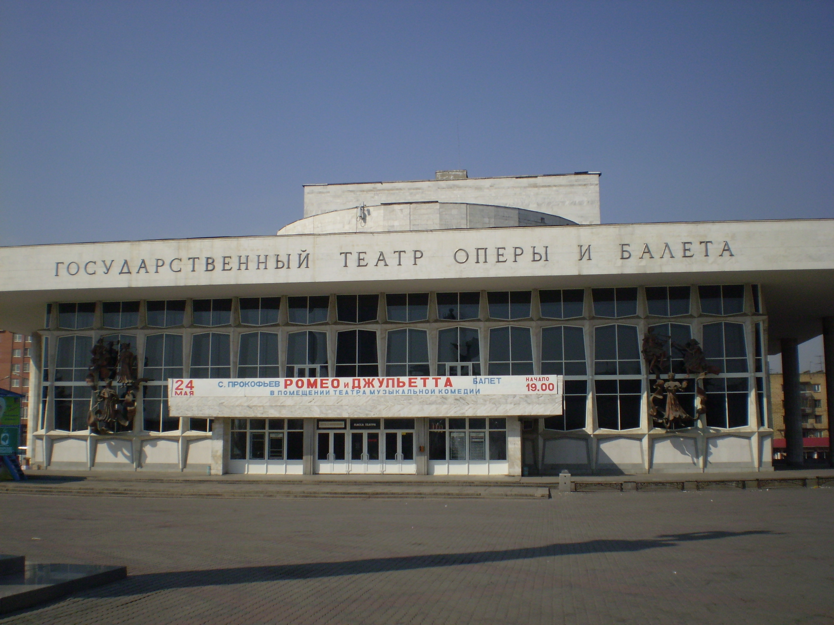 Красноярский театр оперы и балета